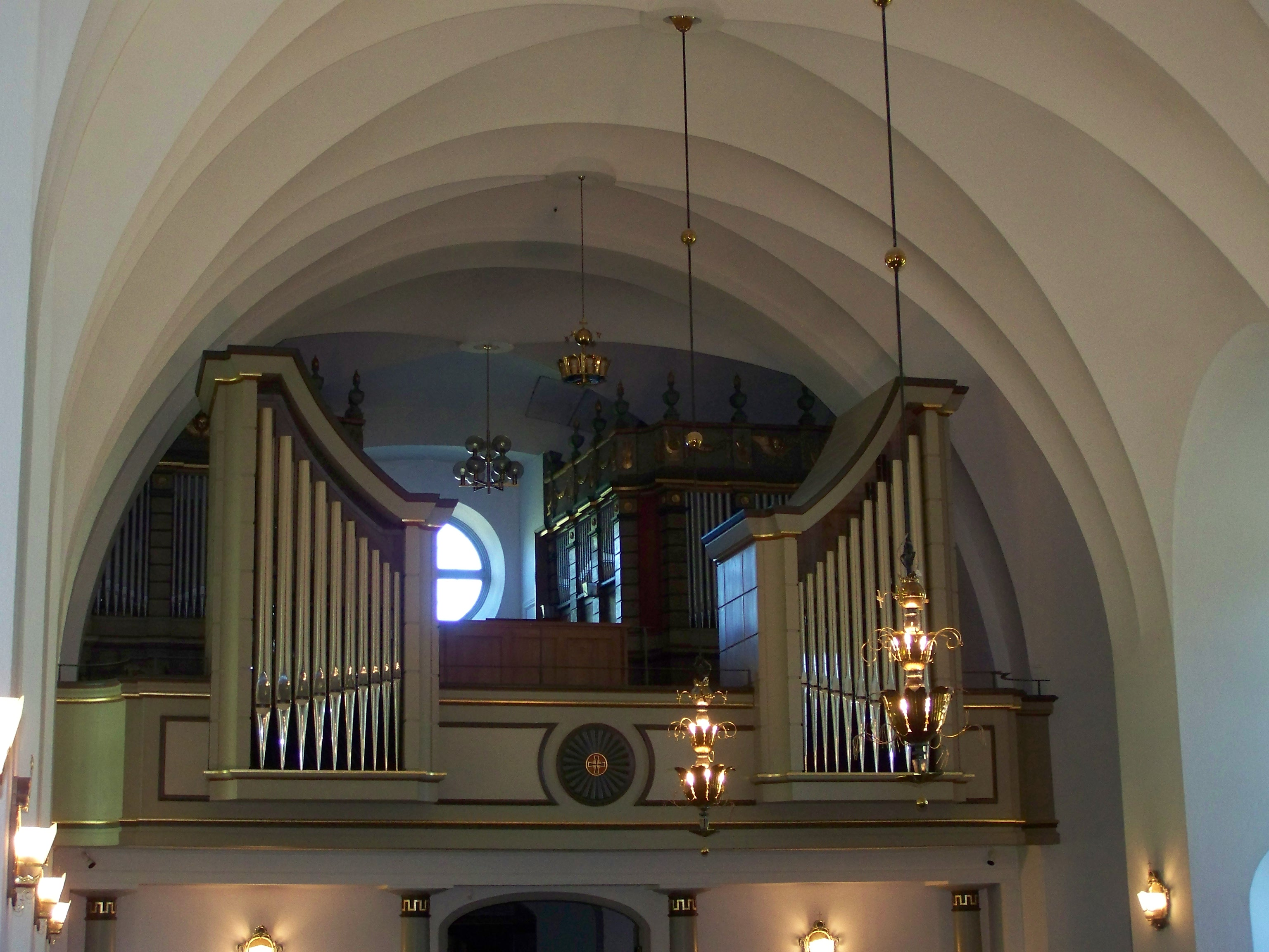 In Kallinge, Schweden. Kirche in Älmhult.